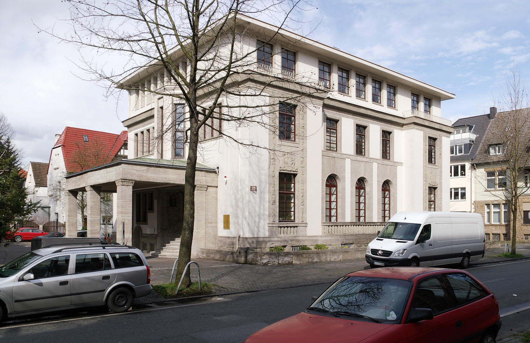 Villa Moritz Klönne, Dortmund, heute von einer Ingenieursozietät genutzt